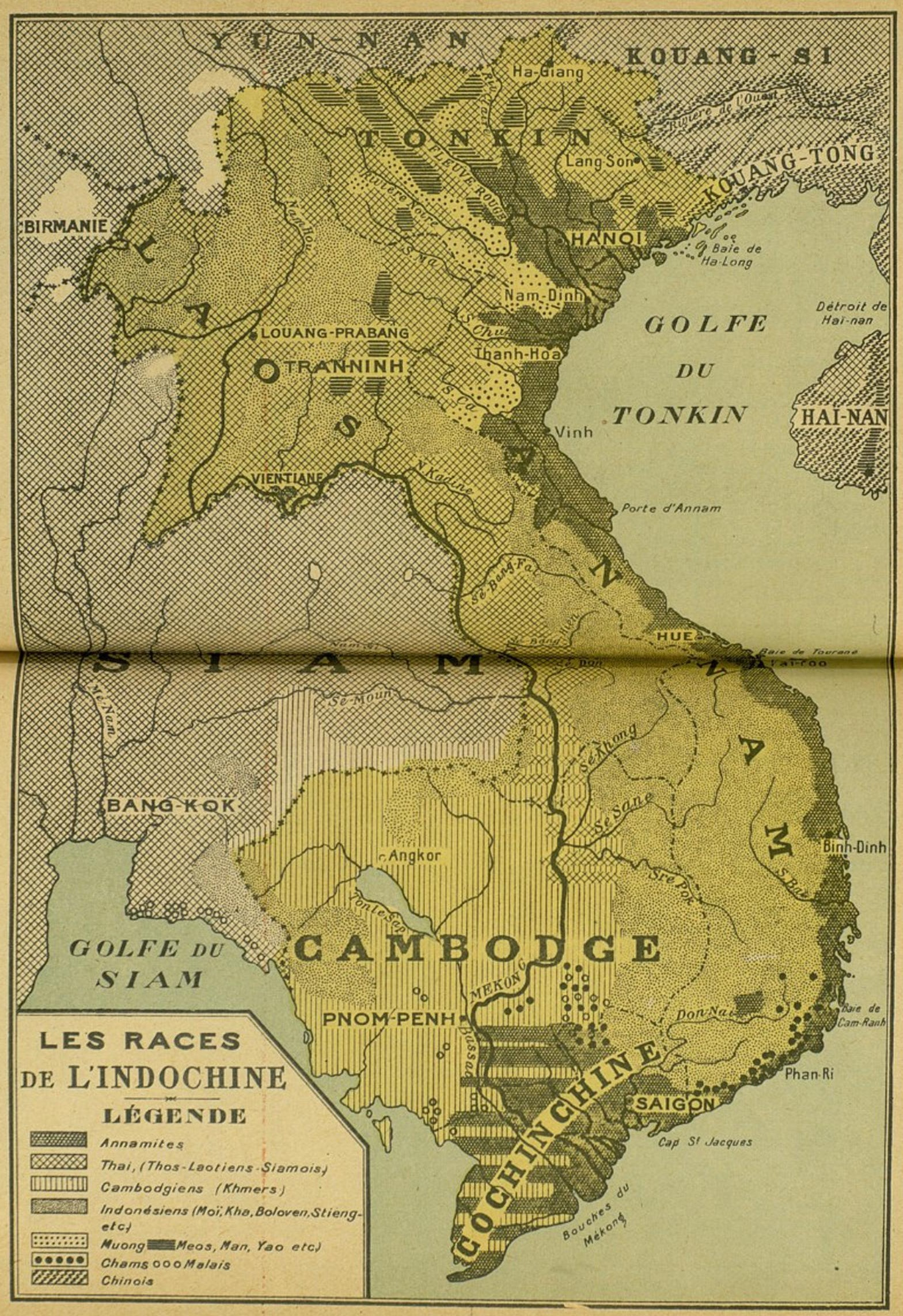 Đông Dương ngày xưa và ngày nay: Phân bố sắc tộc ở Đông Dương